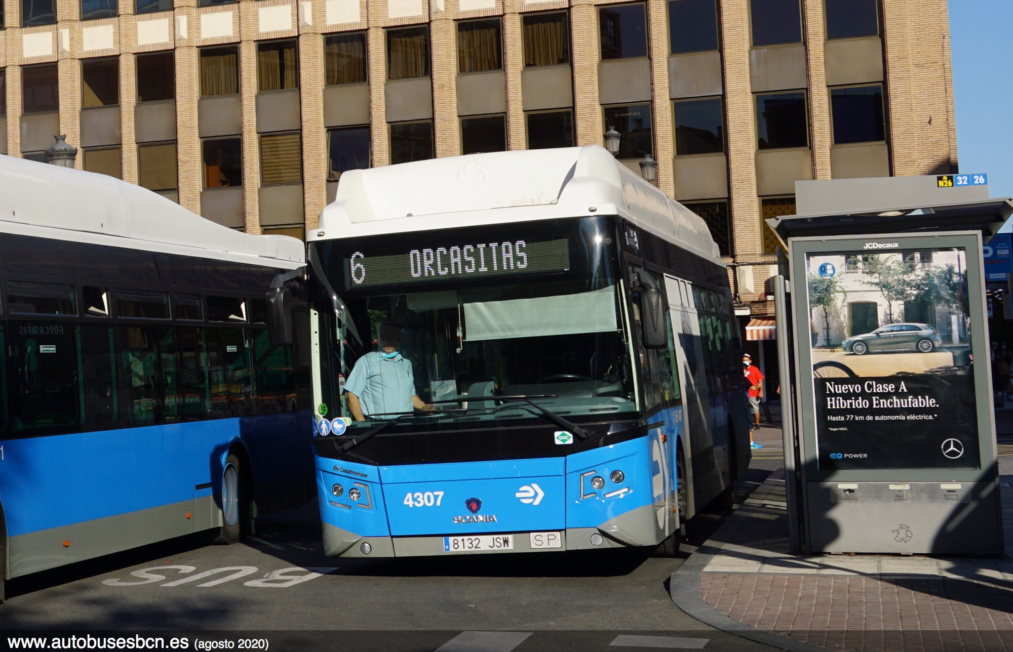 6 EMT Madrid en el terminal de Benavente, agosto 2020